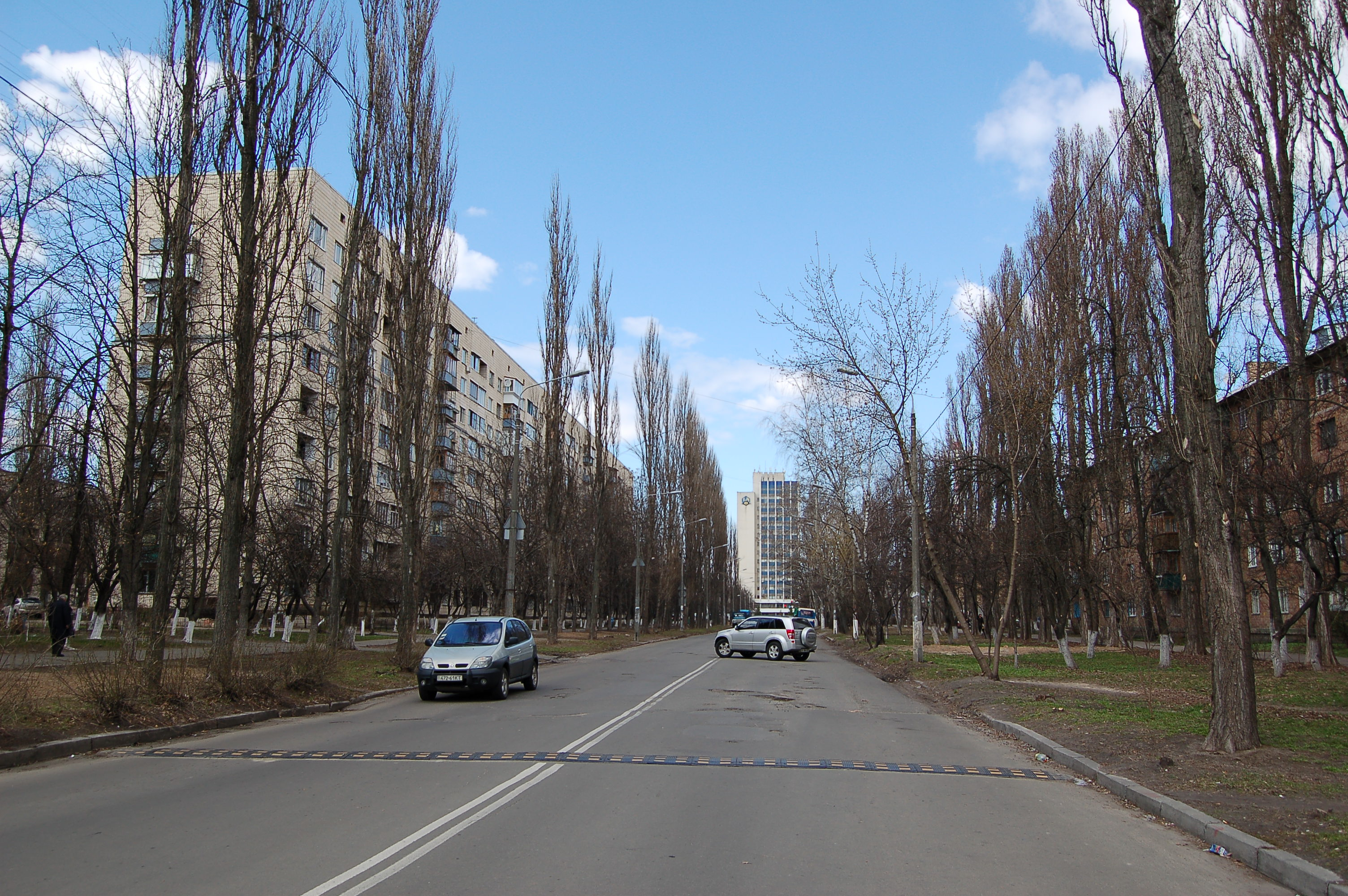 Вулиця Семашка у Києві